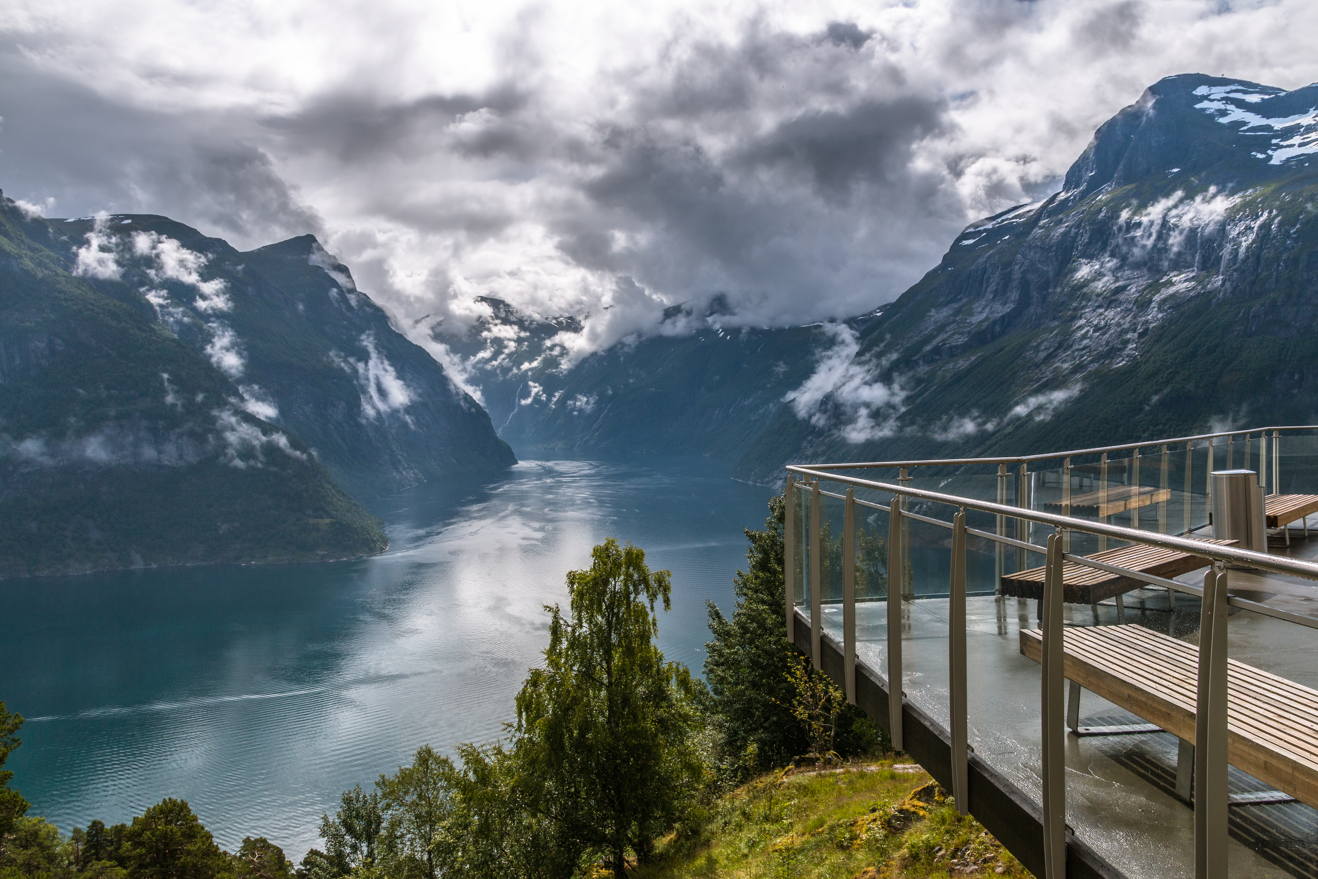 Geirangerfjord Viewpoint